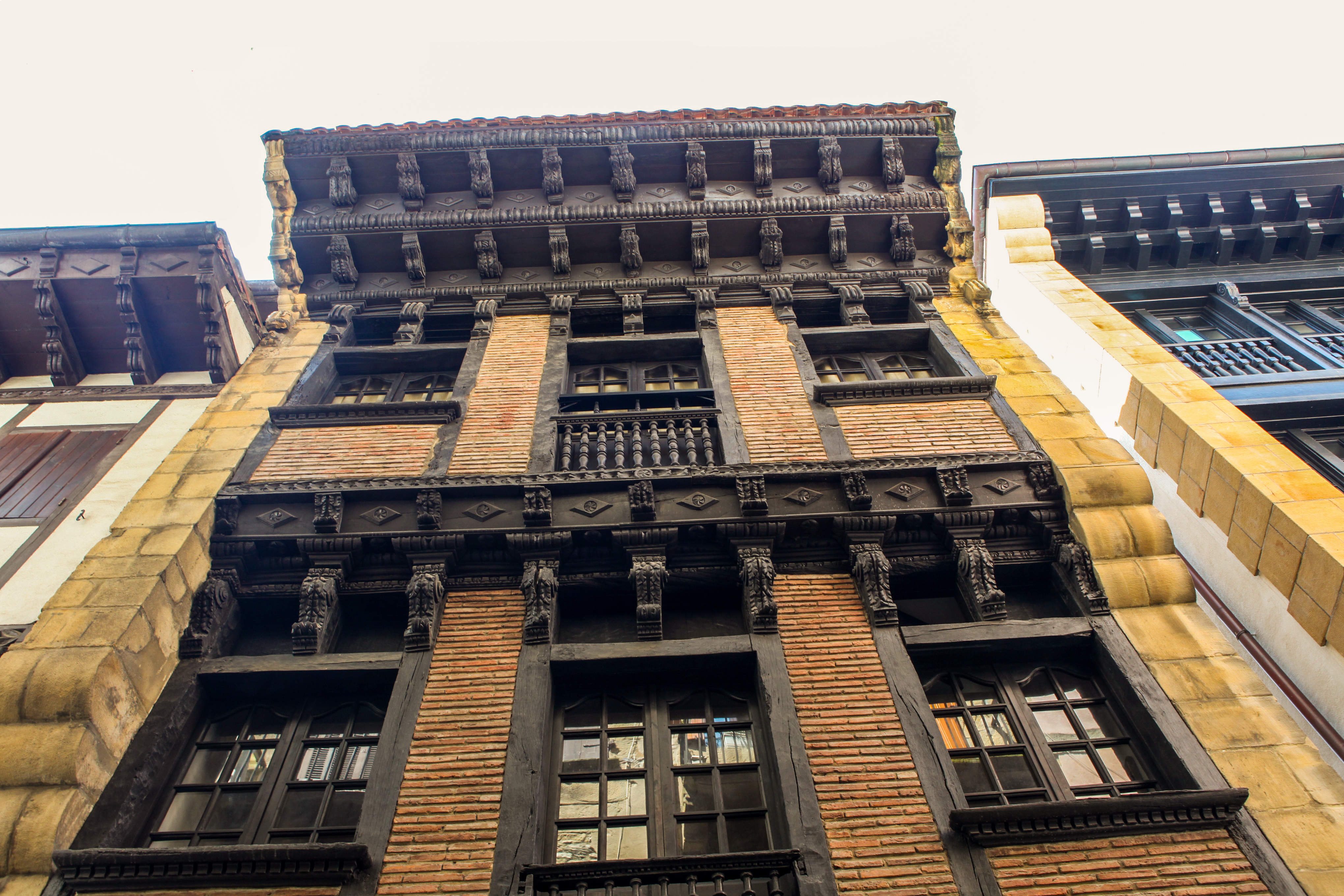 Fachada principal a la calle Pampinot del Palacio Ramery, en la ciudad de Hondarribia (también conocida como Fuenterrabía), País Vasco. Actualmente es sede de Arma Plaza Fundazioa.